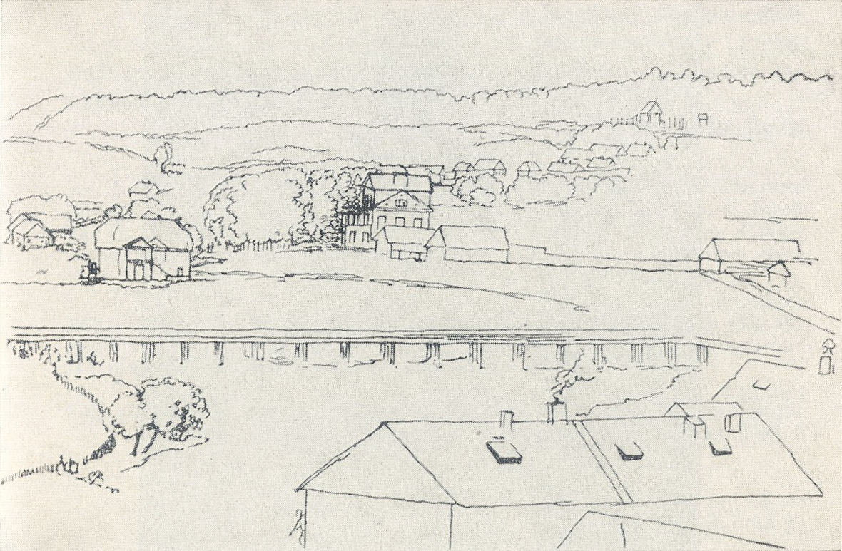 Беларуская (тарашкевіца): Менску (Miensk), Плябанскія Млыны (Plabanskija Młyny) з боку Высокага Места. Месца, дзе стаяў дом Вінцэнта Дуніна-Марцінкевіча